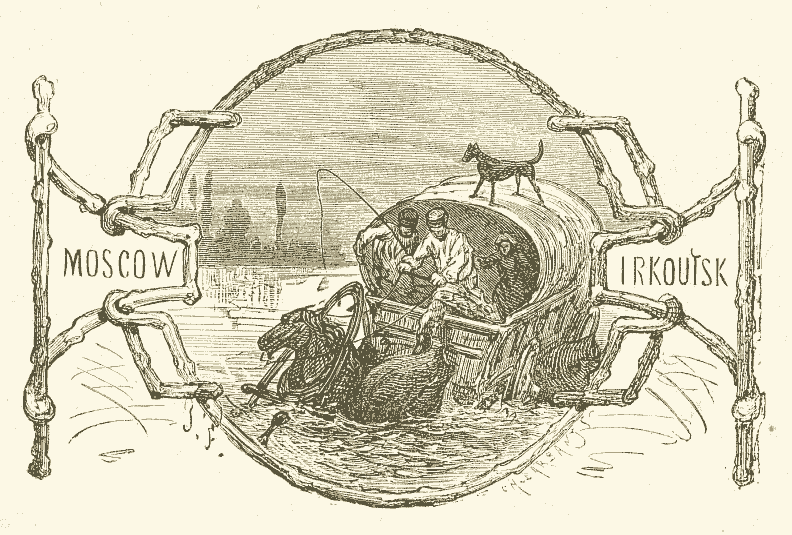 Jules Verne, gravure uit boek "Michael Strogoff", boek is van 1918 of iets ouder. Deze afdruk is uit de Nederlandse vertaling, de zogenaamde "oude blauwe bandjes". Het is uit 1918 of ouder, en kostte 1,50 gulden. Uitgevers-maatschappij "Elsevier", Amsterdam. Stoomdrukkerij P.J. Out Zaandijk.